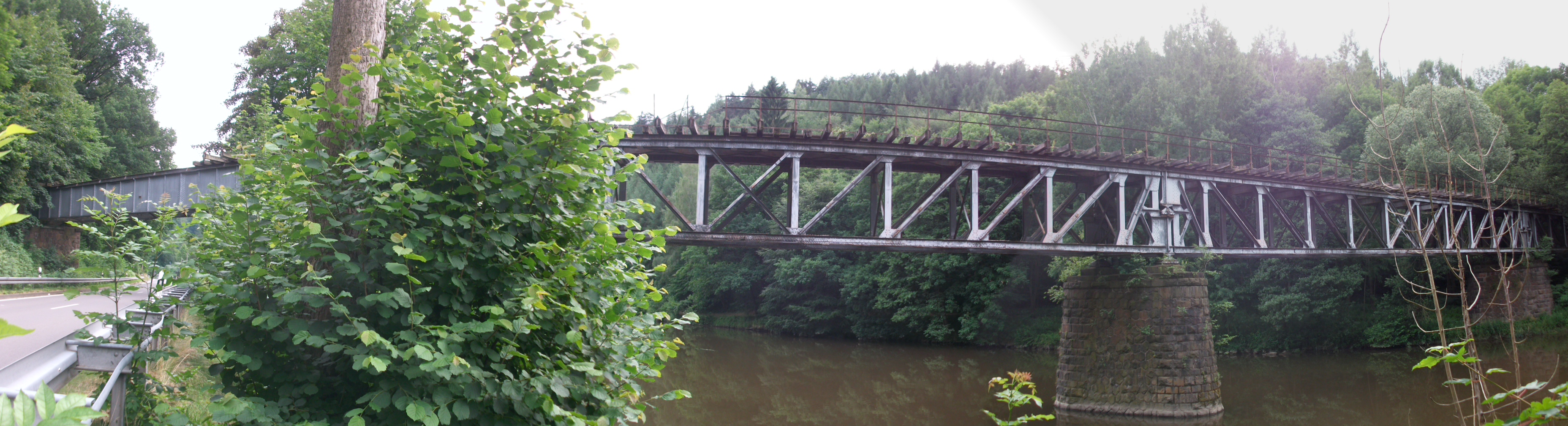 Viadukt Zschopautal zwischen Mittweida und Dreiwerden, Panorama (2016)